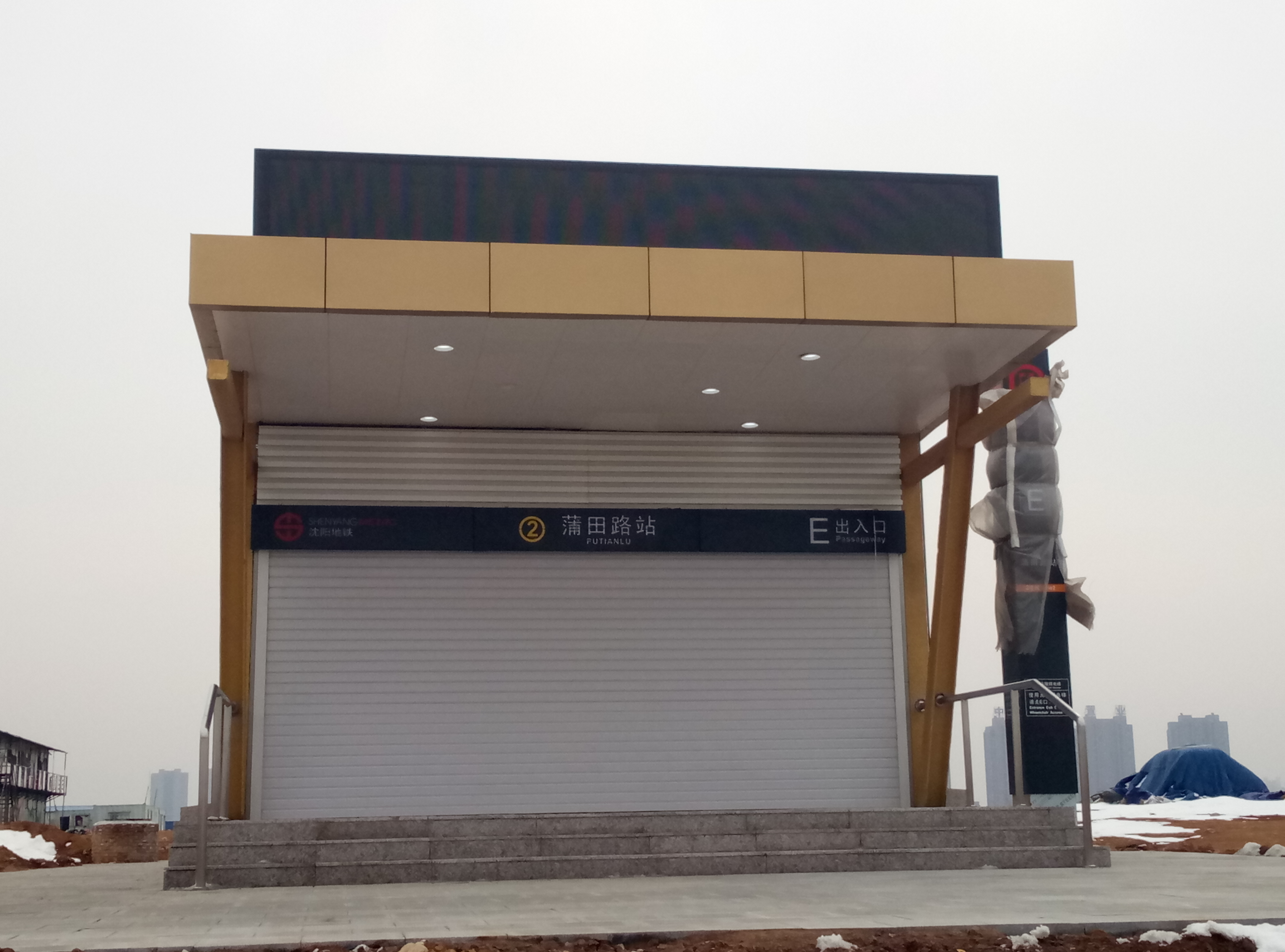 施工中的蒲田路站E出入口。